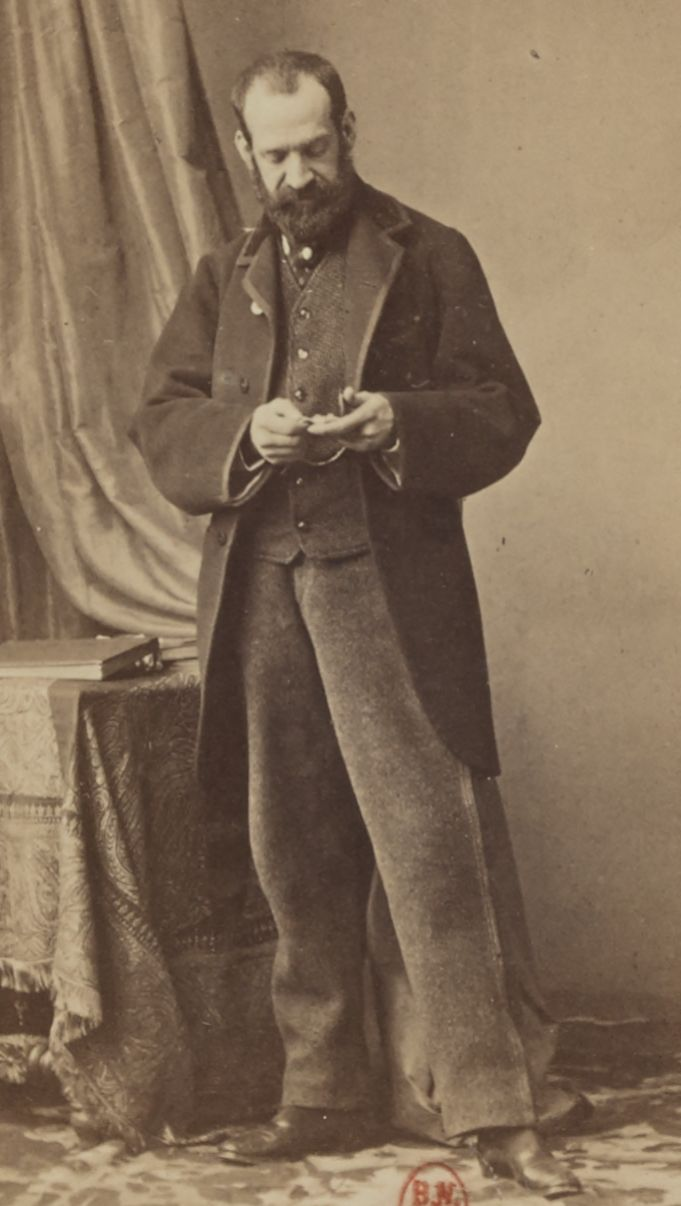 José Güell y Renté (1806-1878), marido de Josefa Fernanda de Borbón, Infanta de España